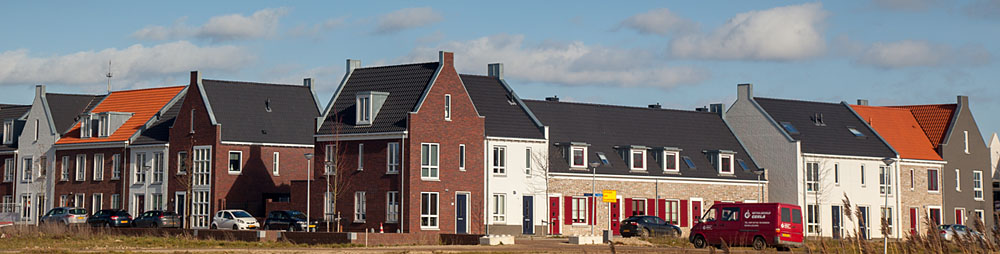 Nieuwbouw de Plantage verloopt spoedig in Meteren datum februari 2014